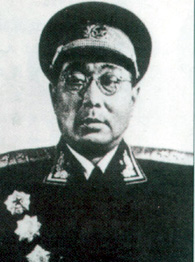 李成芳将军1955年受勋照